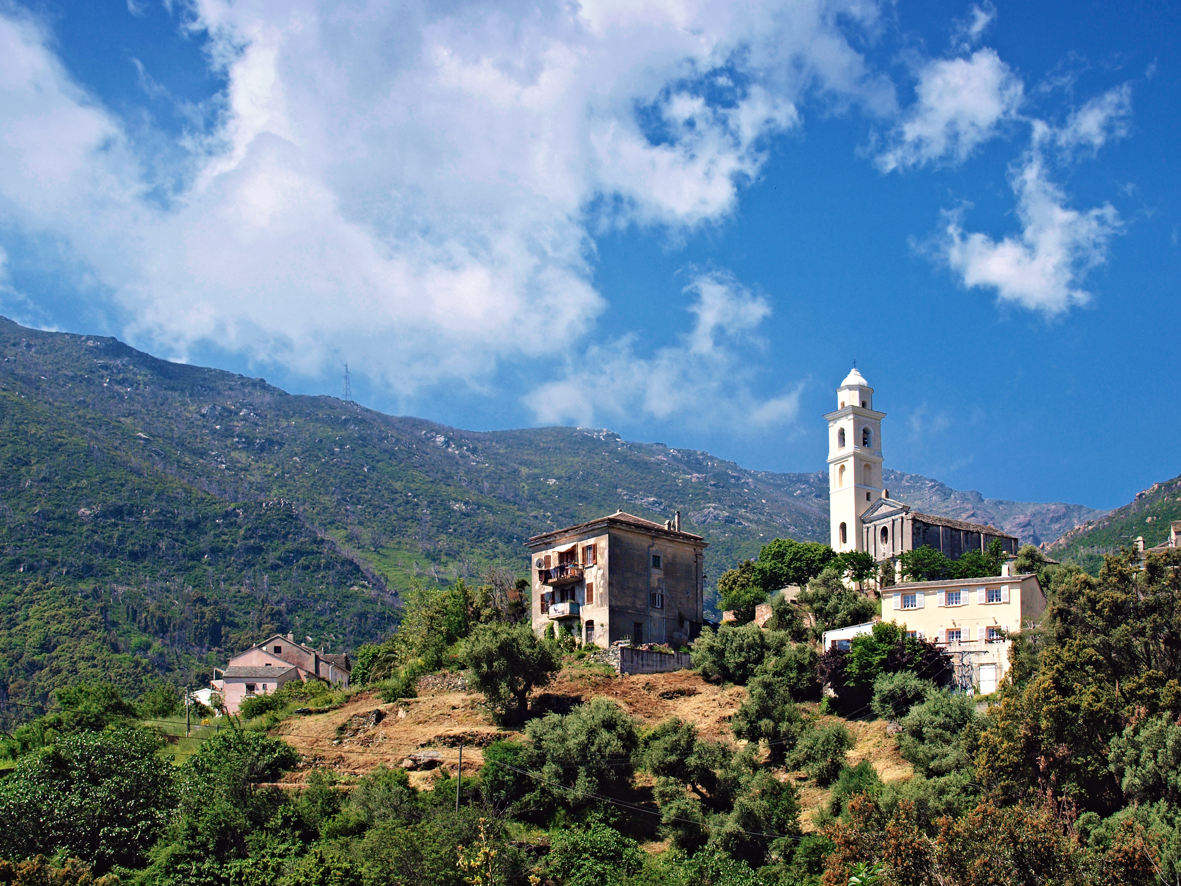 Santa-Maria-di-Lota (Corsica - Mandriale - L'église Santa-Maria Assunta et la chapelle de confrérie Santa Croce